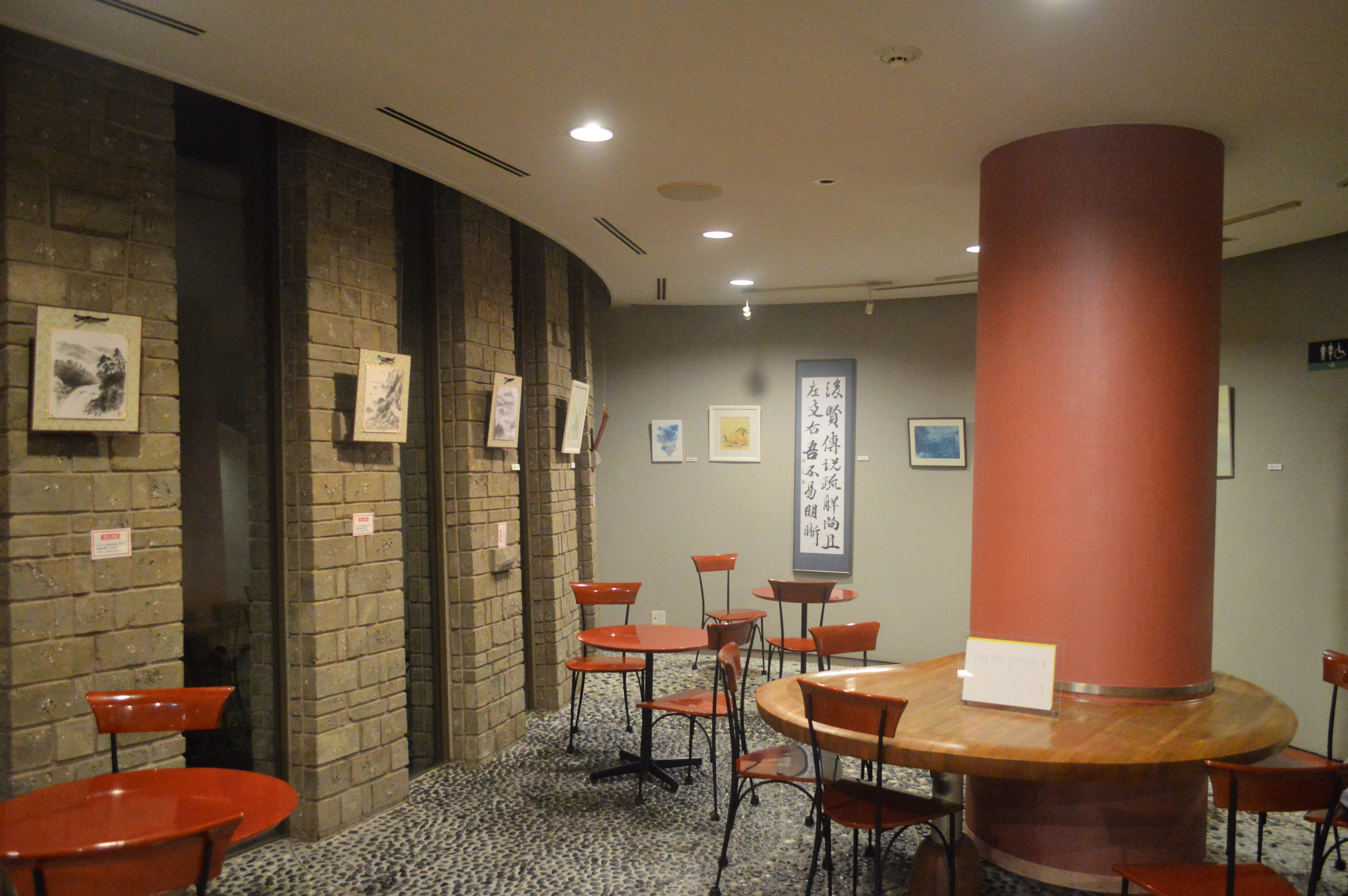 静岡市のサールナートホール。1階。